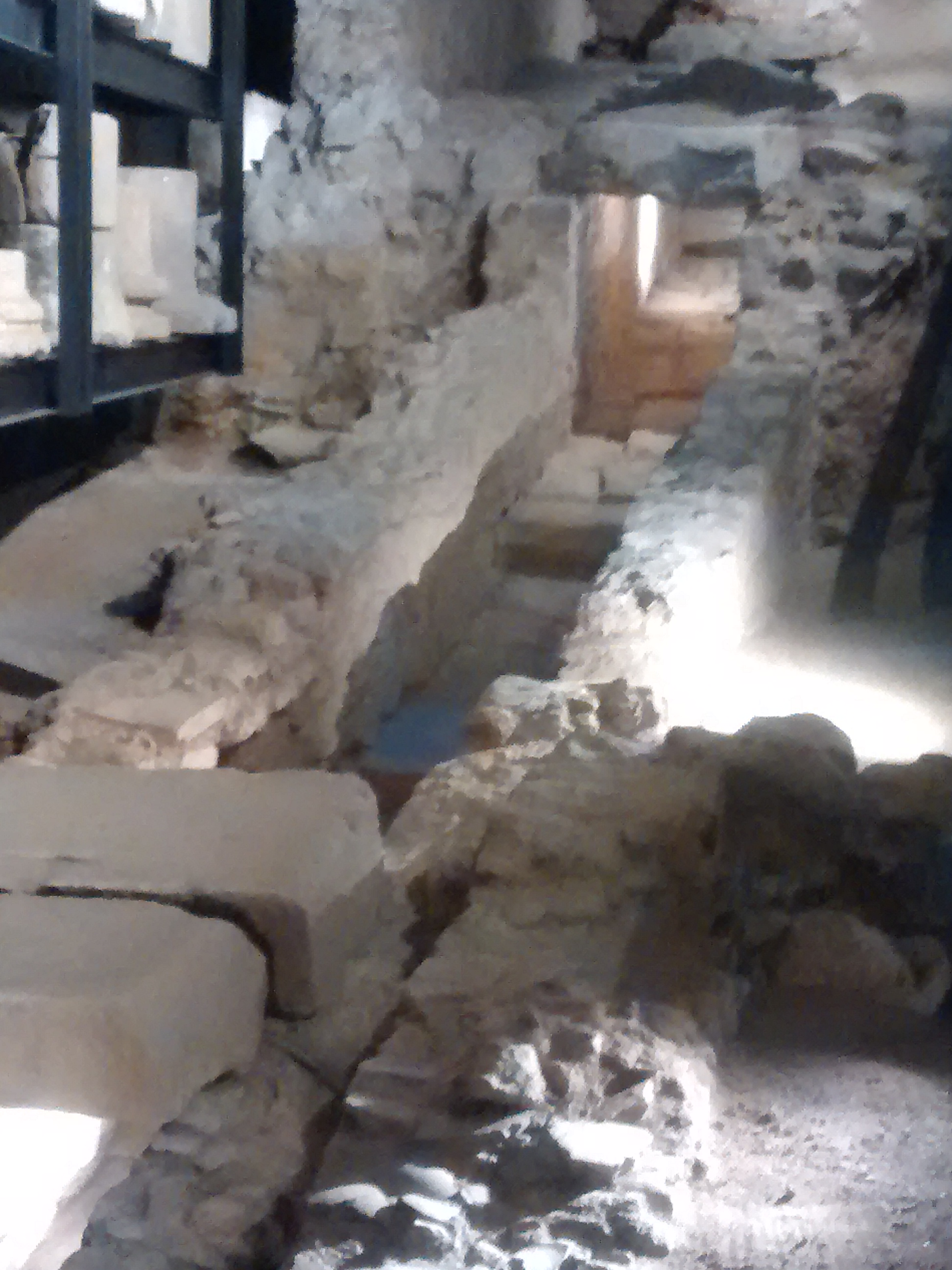 Claveguera del cardo maximus de Baetulo, sota la plaça de Font i Cusó, en el soterrani del Museu de Badalona.